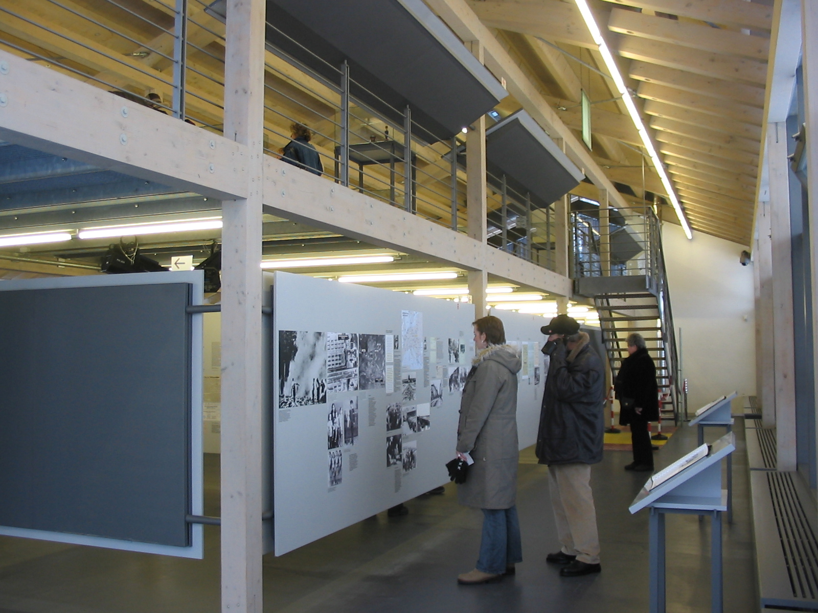 Berchtesgaden Obersalzberg Documentation Center visitors.